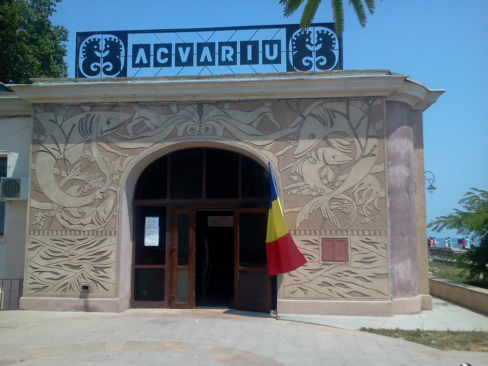 Constanța 2017: acvariul